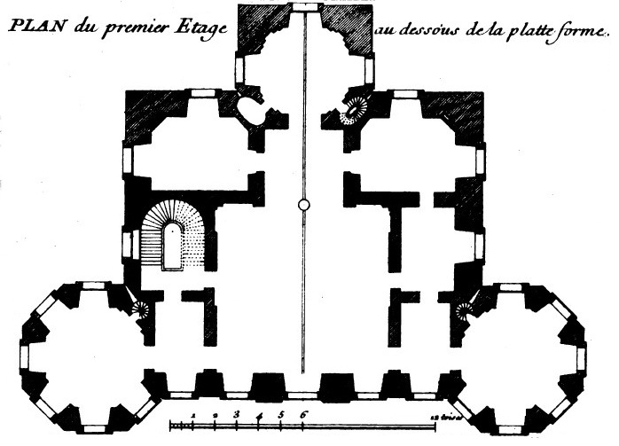 Plan du deuxième étage de l'Observatoire royal de Paris